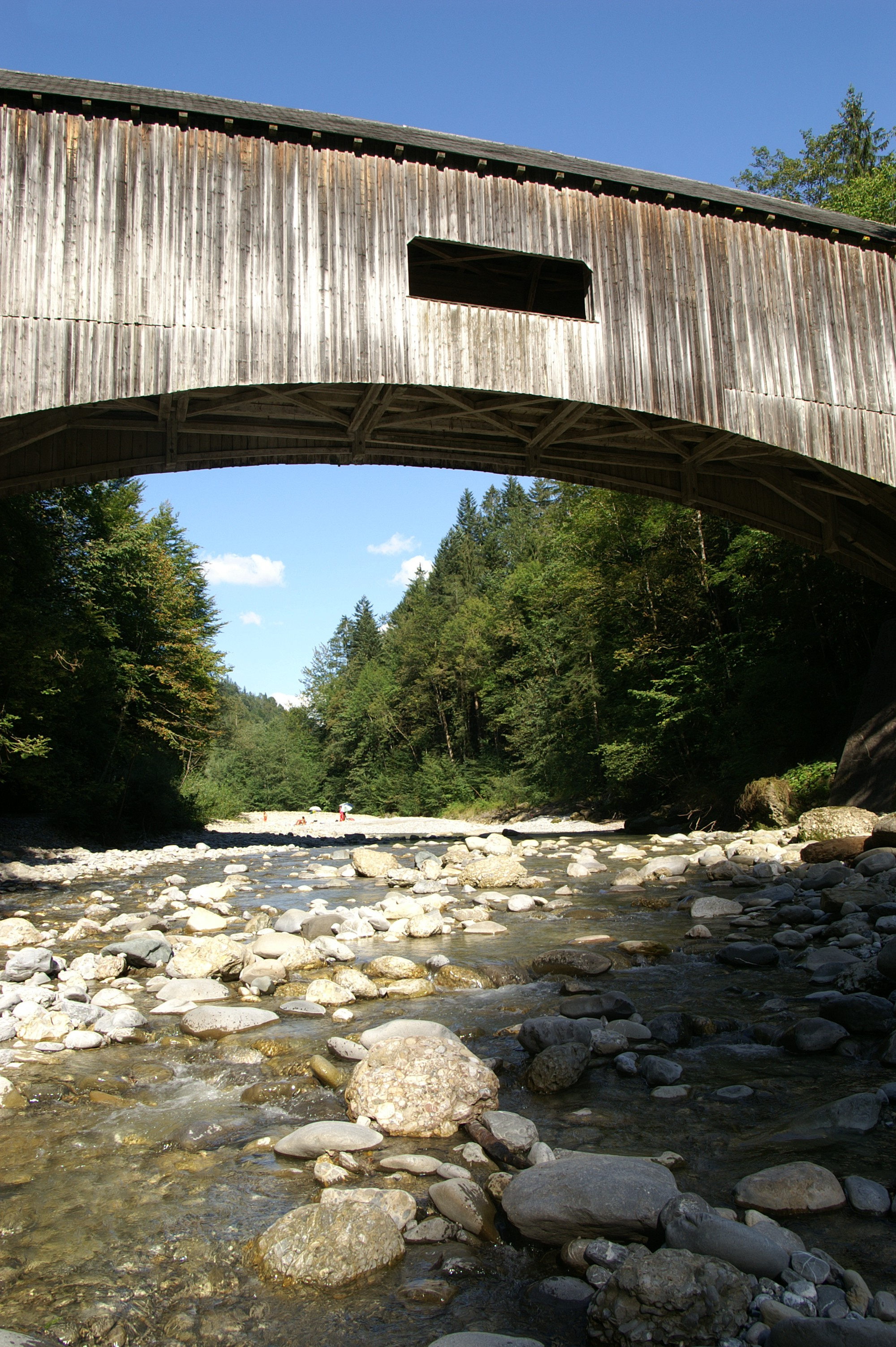 aus dem DEHIO Vorarlberg 1983: Gschwendtobel-Brücke über die Subersach. Errichtet 1830 nach Plänen von Alois Negrelli. Gedeckte Holzbrücke mit 6fach verstärktem Hängesprengwerk. *** In Lingenau im Bregenzerwald , Vorarlberg